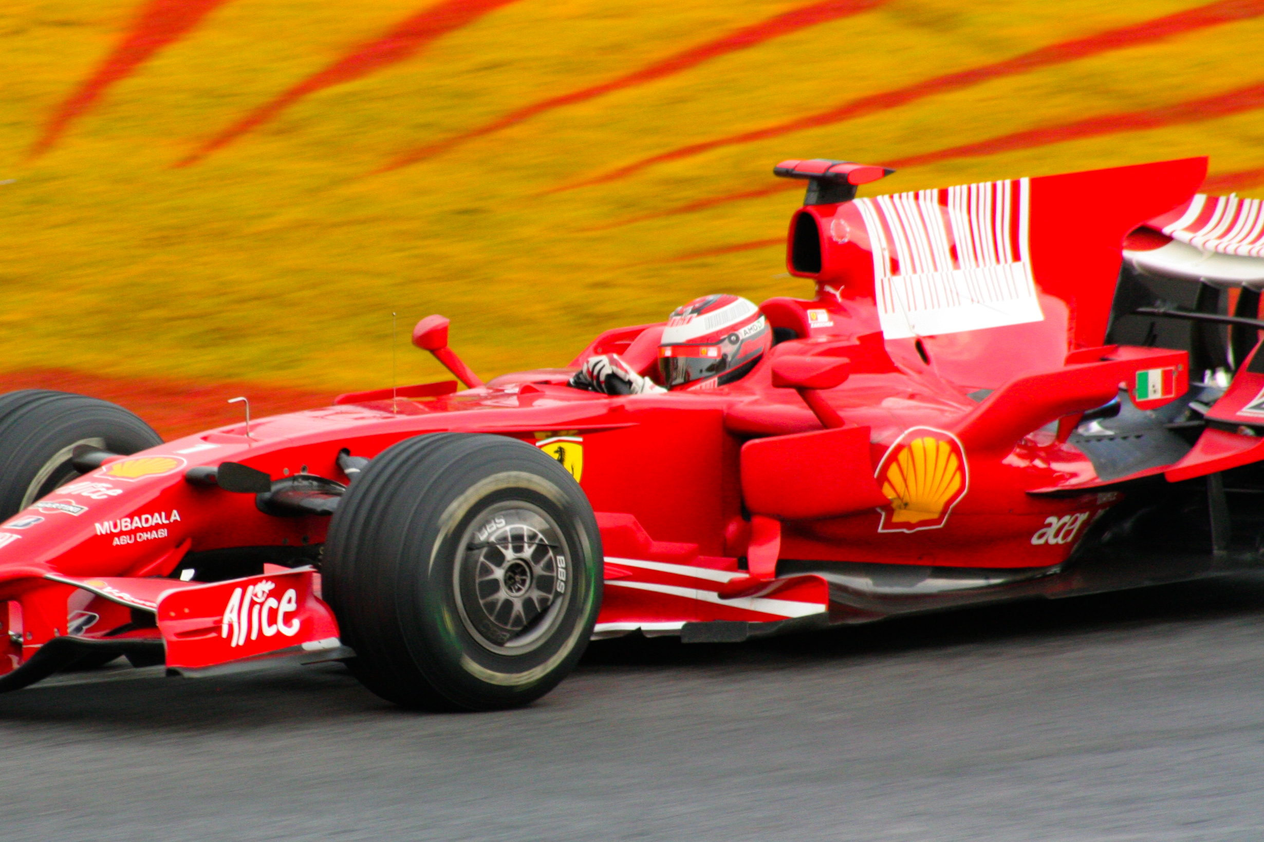 Raikkonen at BRazil